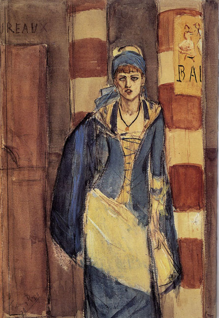 La Buveuse d'absinthe, Craie noire, aquarelle et gouache